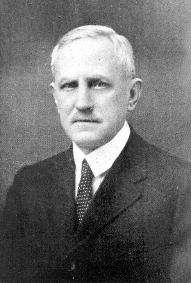 Weszelszky Gyula magyar kémikus, gyógyszerész, radiológus.